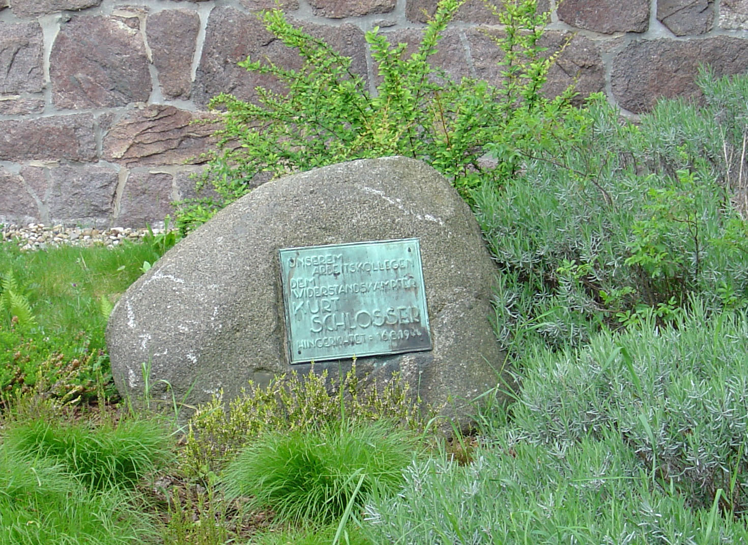 Kurt Schlosser Gedenkstein vor den Deutschen Werkstätten in Dresden Hellerau (Original text: Kurt Schlosser Gedenkstein)